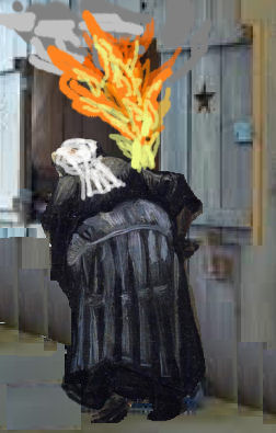 Nedersaksies: Aaltje Kraak hef de beddestee in braand